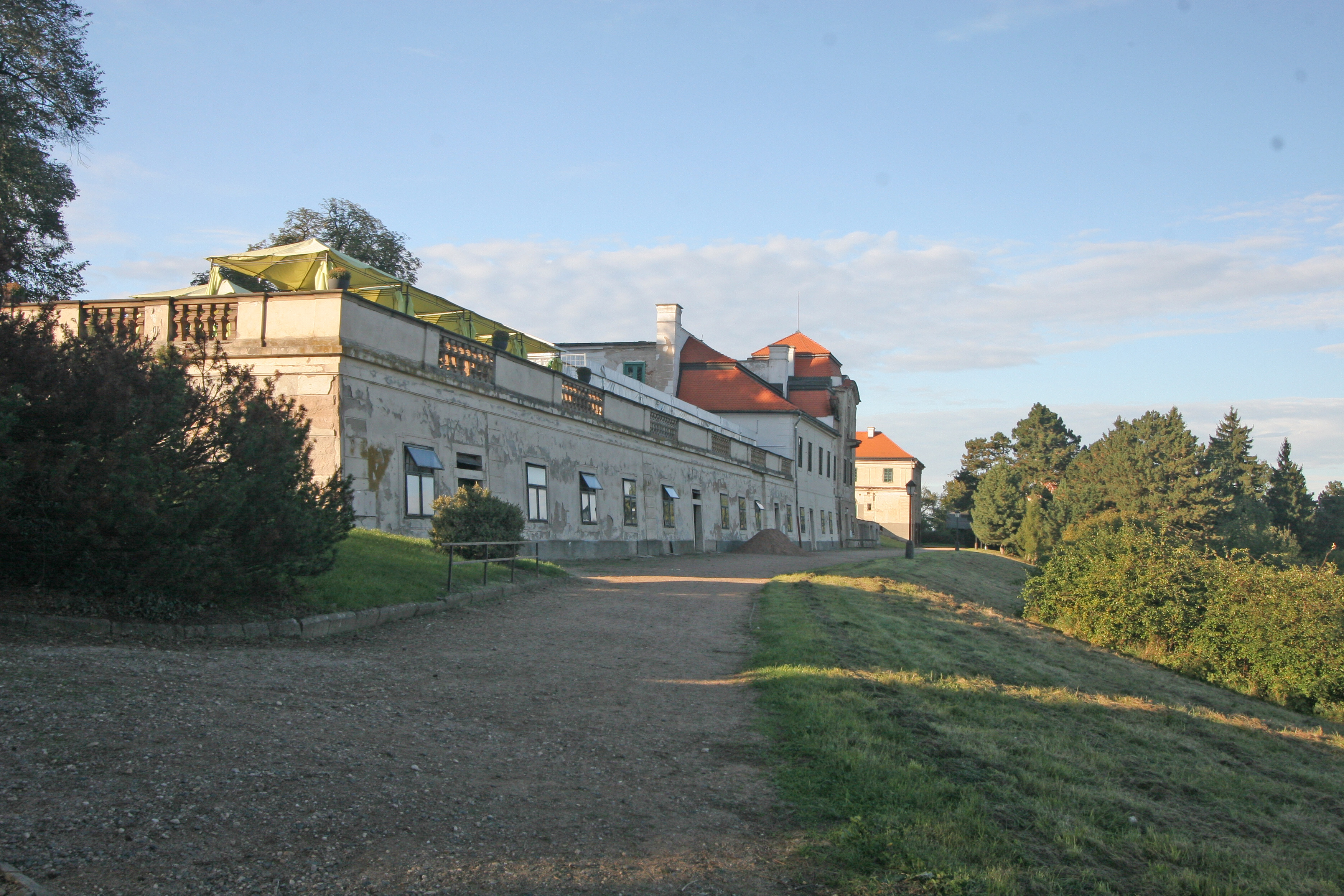 Zámek Karlova Koruna - areál Chlumec nad Cidlinou, Chlumec nad Cidlinou 1